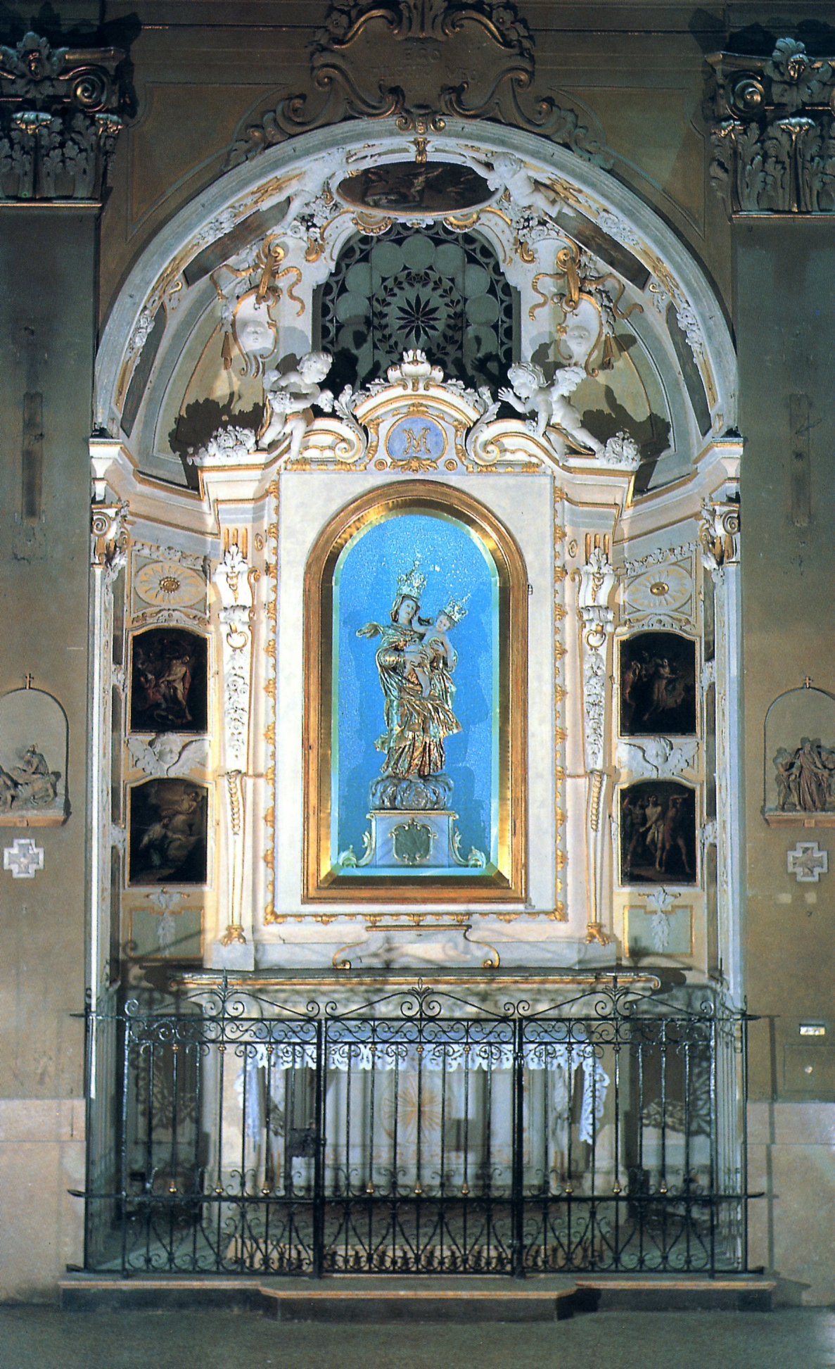 Carbonate, chiesa parrocchiale di Santa Maria Assunta: la cappella dedicata alla Madonna del Rosario.